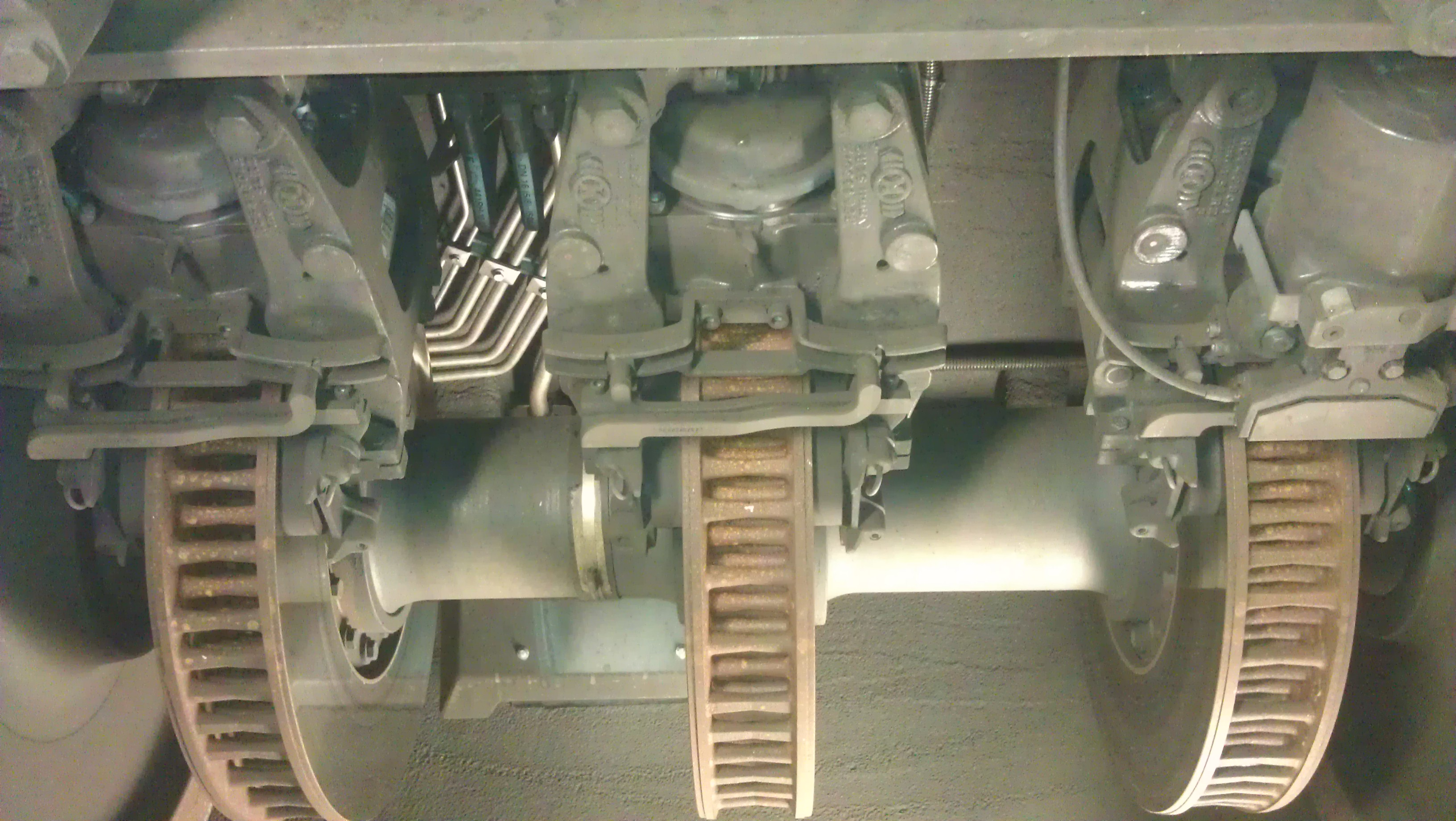 Wellenbremsscheiben(innenbelüftet) mit Bremszangen eines Stadler Kiss